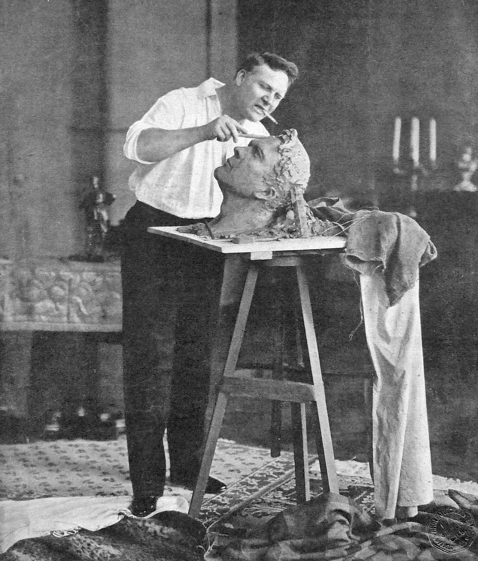 Ф.И. Шаляпин лепит самого себя